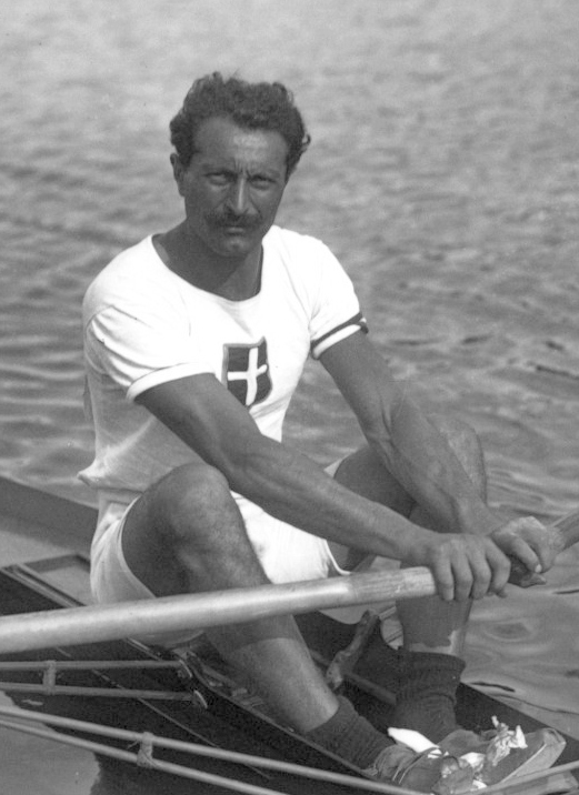 [24-8-13, Gand] Sinigaglia [finaliste du championnat d'Europe de un rameur dans son bateau sur le canal Gand-Terneuzen] : [photographie de presse] / [Agence Rol]